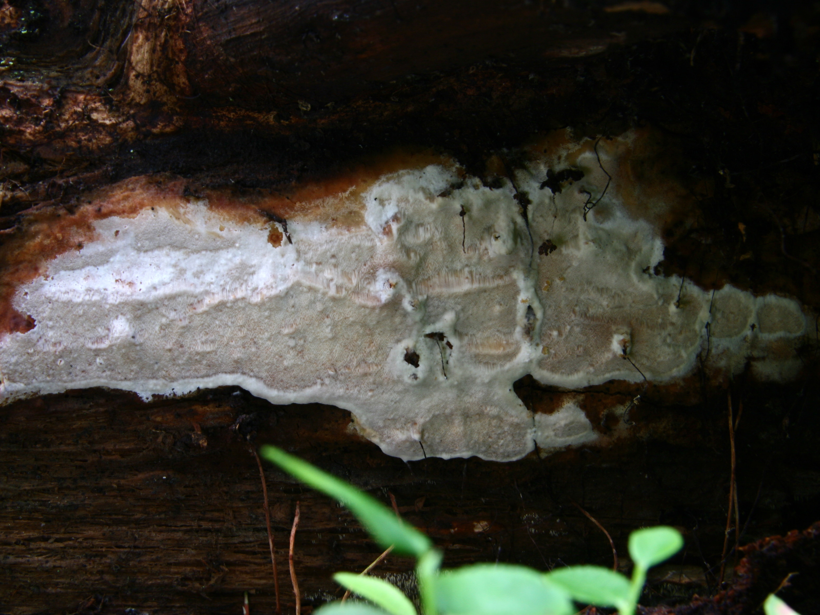 Kristallticka